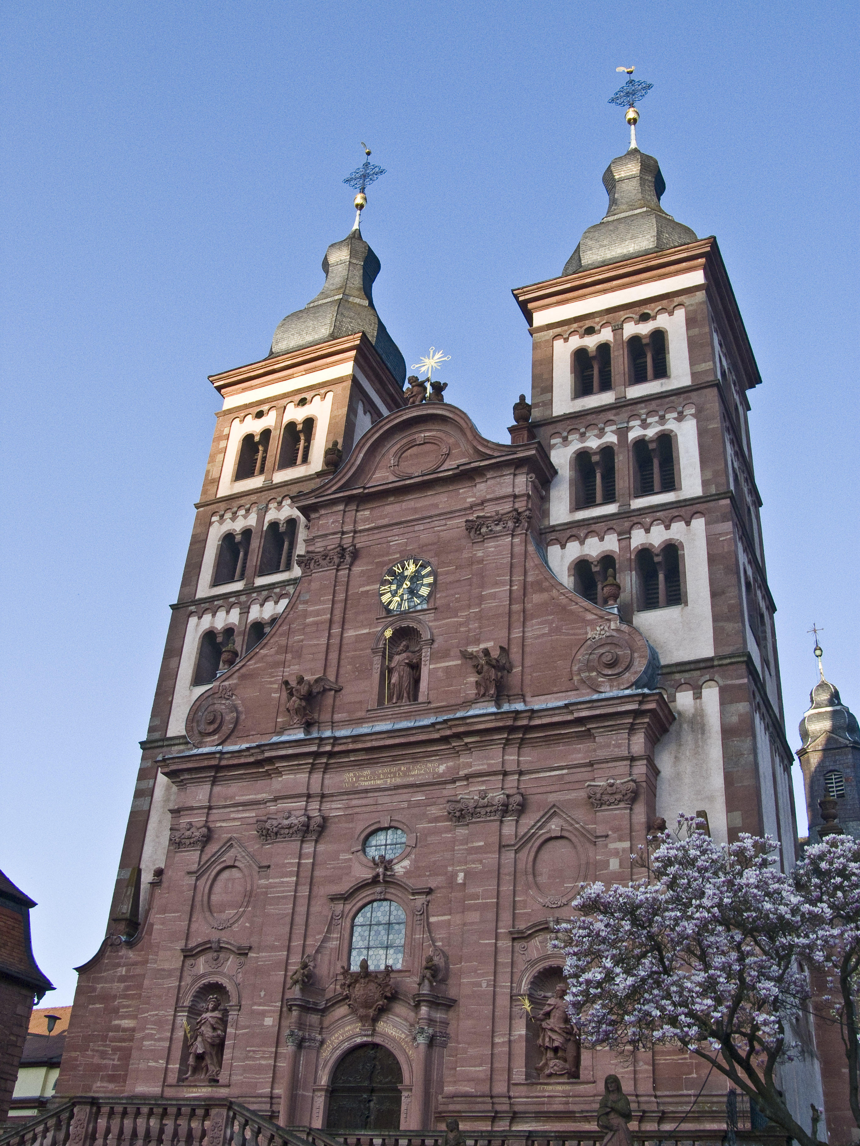 Amorbach, Abteikirche